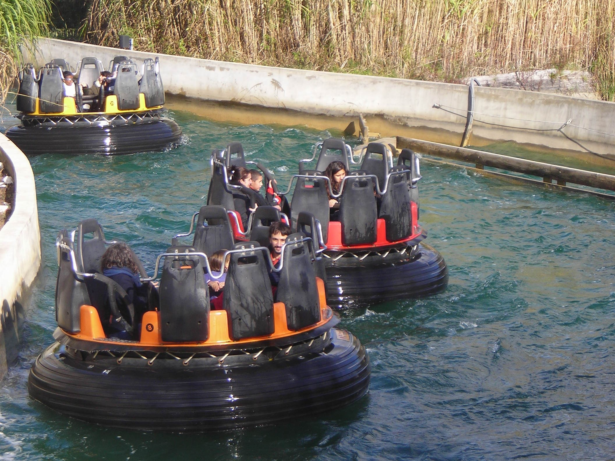 Attraction Romus et Rapidus Parc Astérix